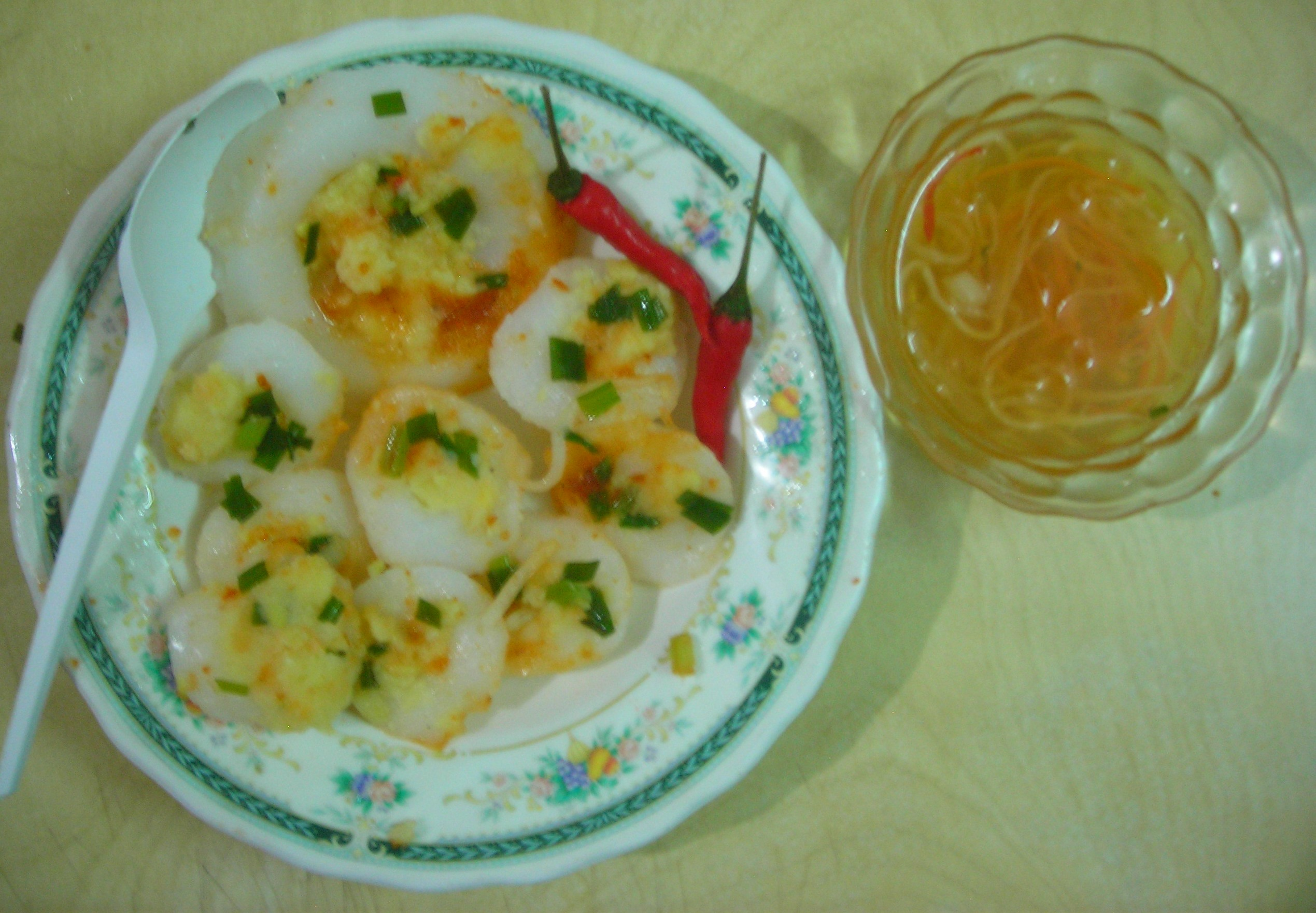 Bánh bèo de Saigon